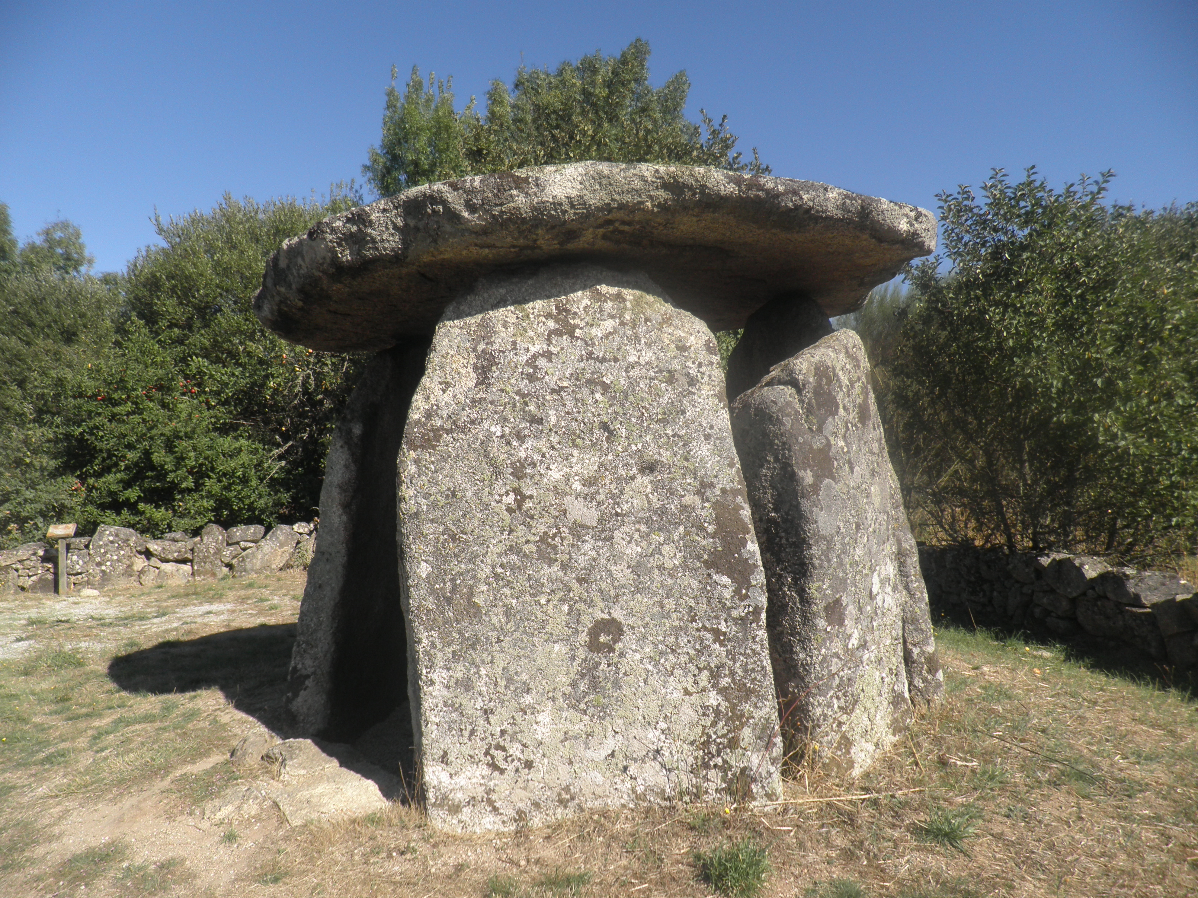 Guarda, monumento funerário do Neo-Calcolítico.